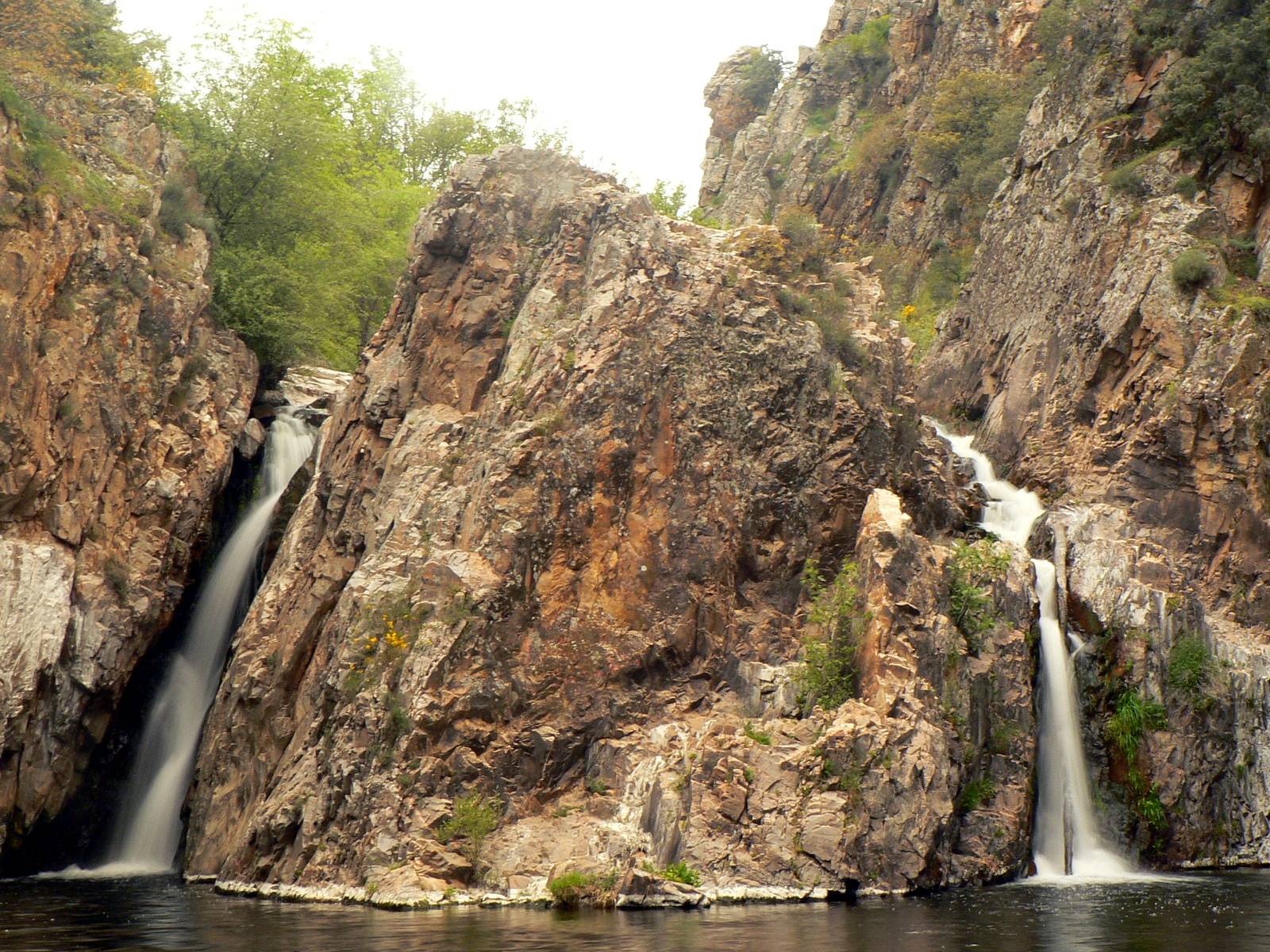 Charco del Hervidero en el río Guadalix en primavera. Imagen tomada con filtro de densidad neutra.